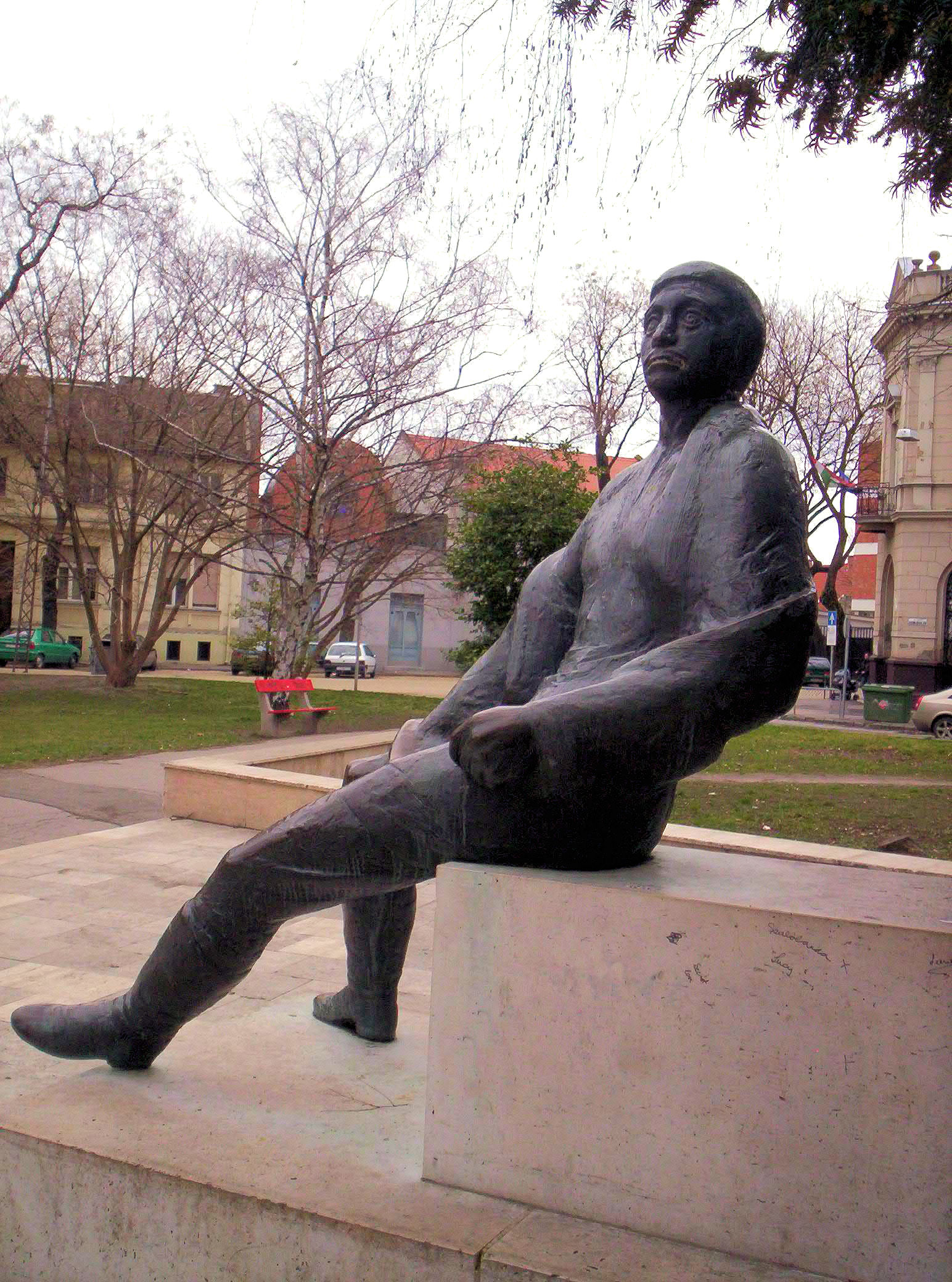 Katona József szobra Kecskeméten. Vigh Tamás alkotása (1962)